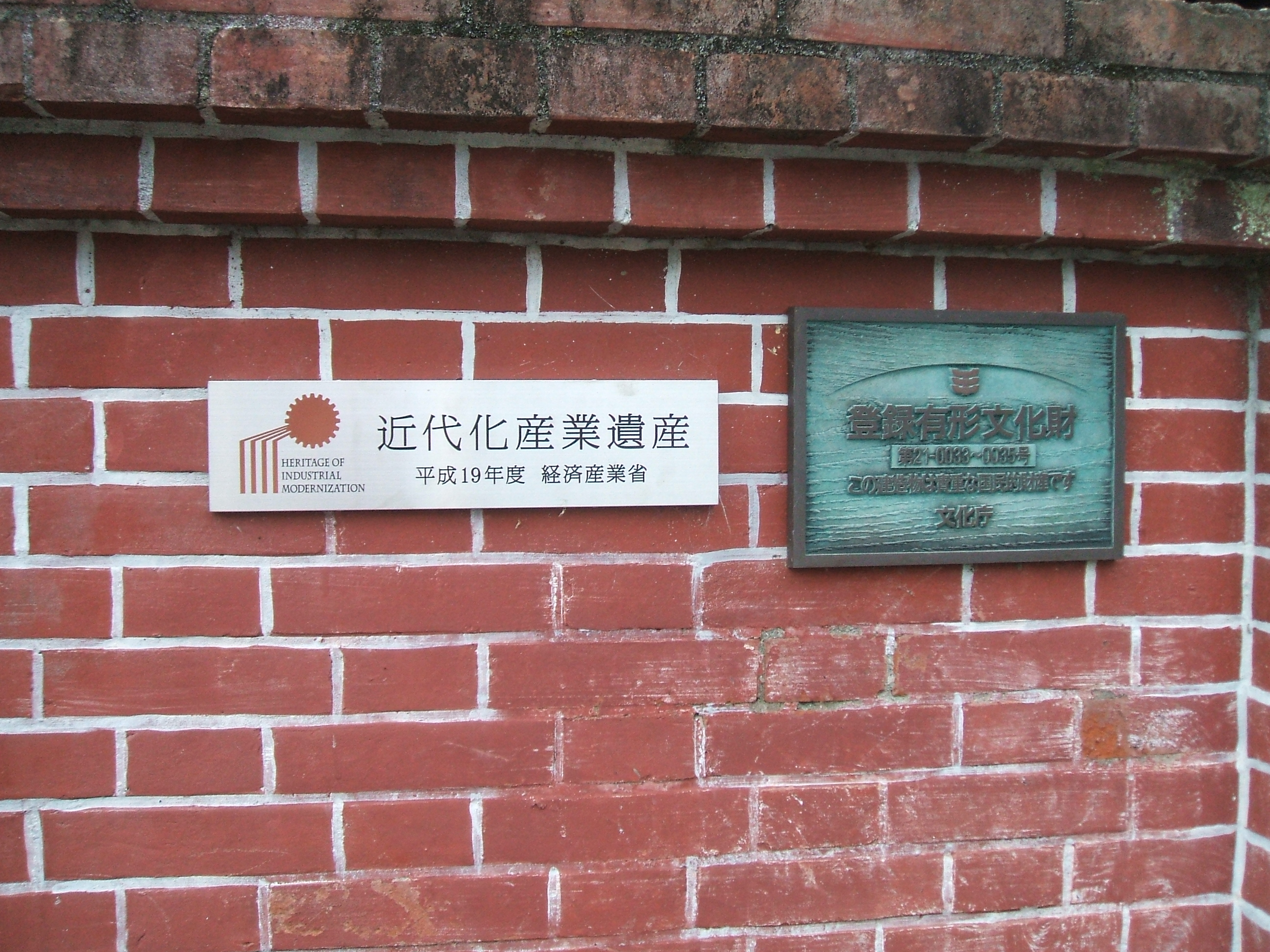 レンガの壁に貼られた登録プレート。